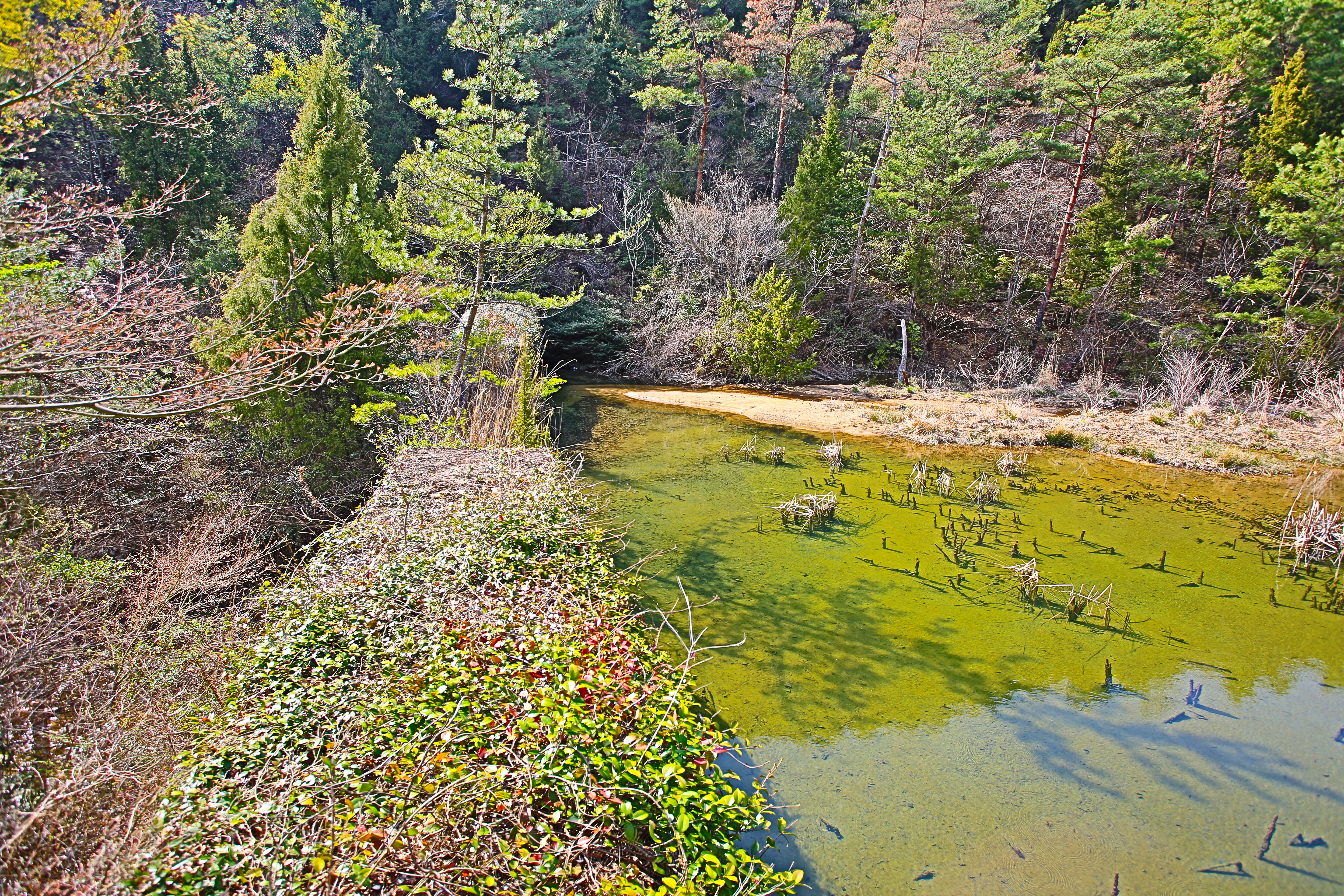 広島県福山市本郷町本郷温泉地区の大谷川上流にあるコンクリート製の砂防ダム。広島県道158号線沿い。